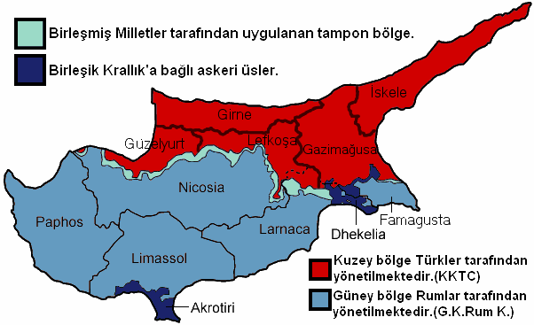 Kıbrıs idari bölgeler.